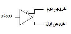 آی‌سی max9360